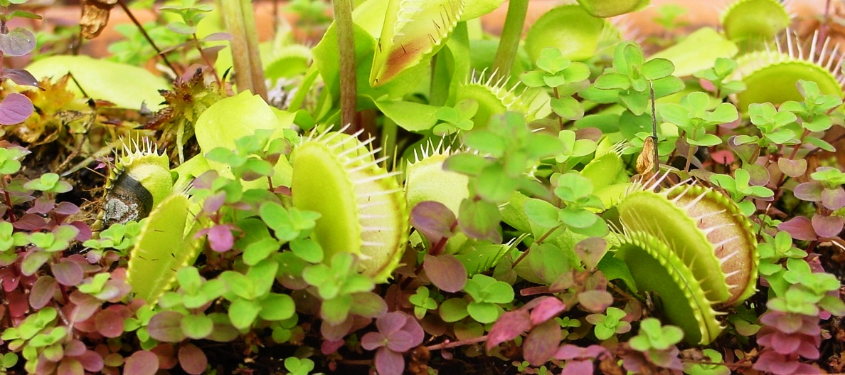 Dioanea muscipula (Giardino dei Semplici, Florence, Italy)